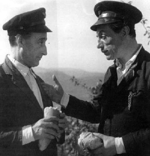 Totò e Eduardo De Filippo nel film "Napoli Milionaria" (1950) Regia, Eduardo De Filippo.